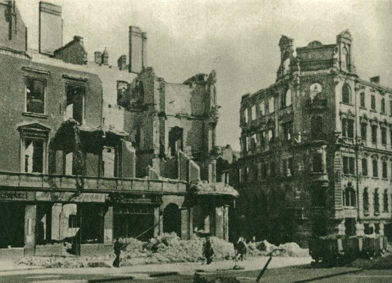 Plac Wiosny Ludów